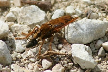 Sicily Asilus crabroniformis